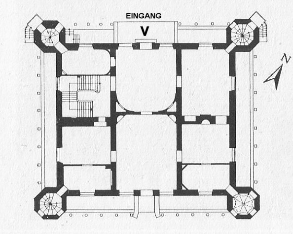 Schloss Ahrensburg, Grundriss